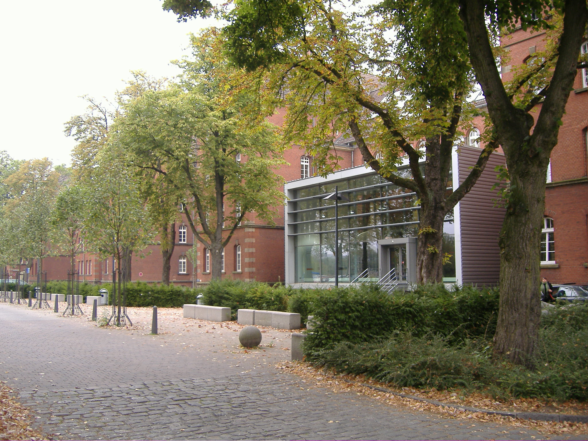 ehem. Reiterkaserne, 1898-1901 gebaut als Paradebeispiel preußischer Kasernenarchitektur, heute Teil der Fachhochschule Leonardo-Campus, Münster, Deutschland Tag des offenen Denkmals, Panoramafreiheit Foto: Elkin Fricke --Managementboy 12:03, 16 September 2005 (UTC)